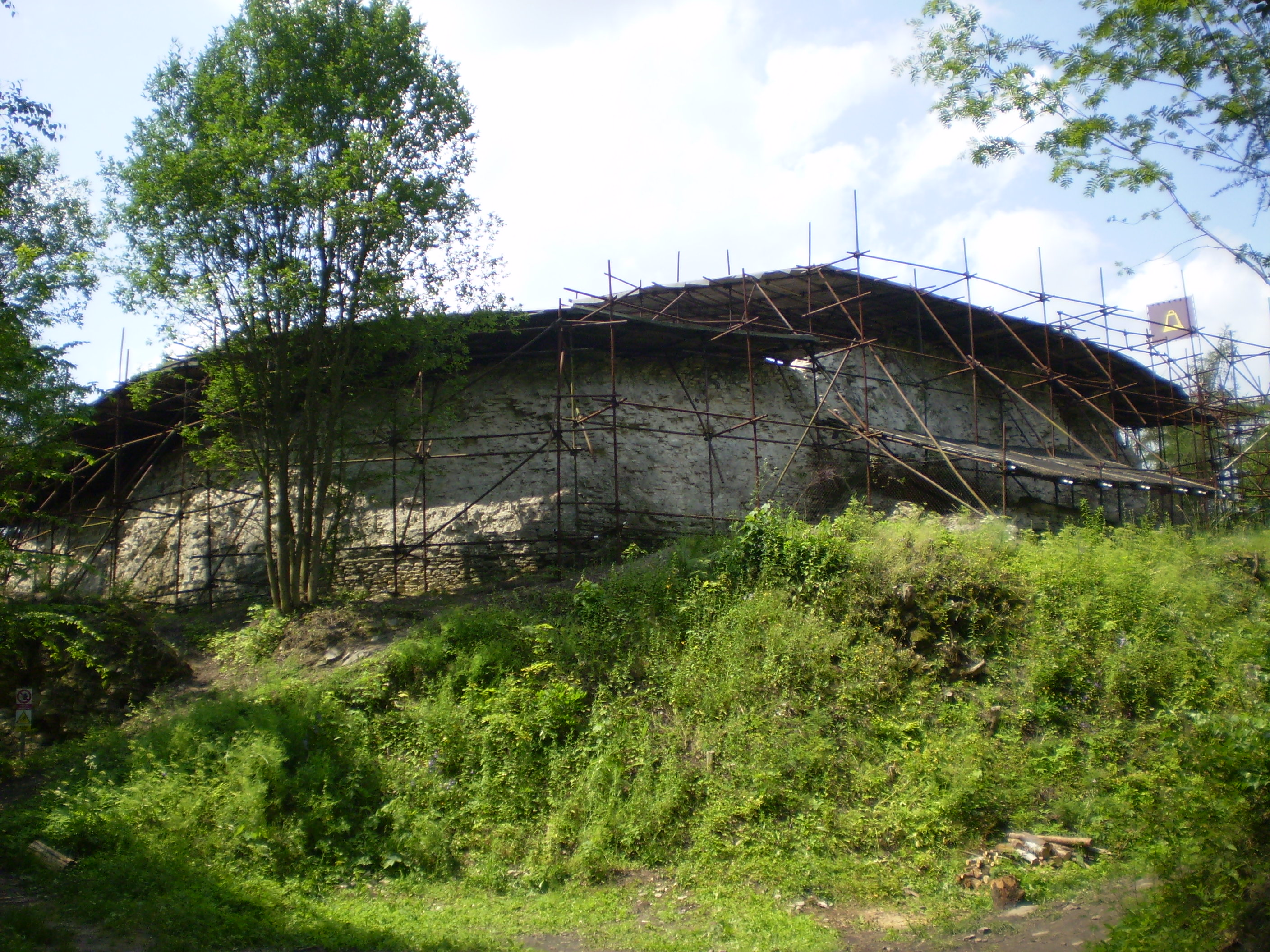 Zřícenina Vízmburk.